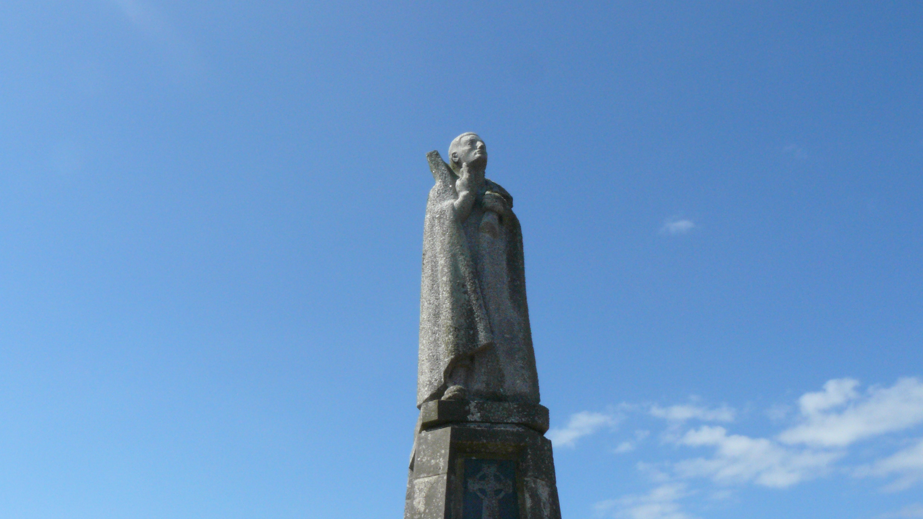 Statue de l'écrivain et soldat Jean-Pierre Calloc'h.